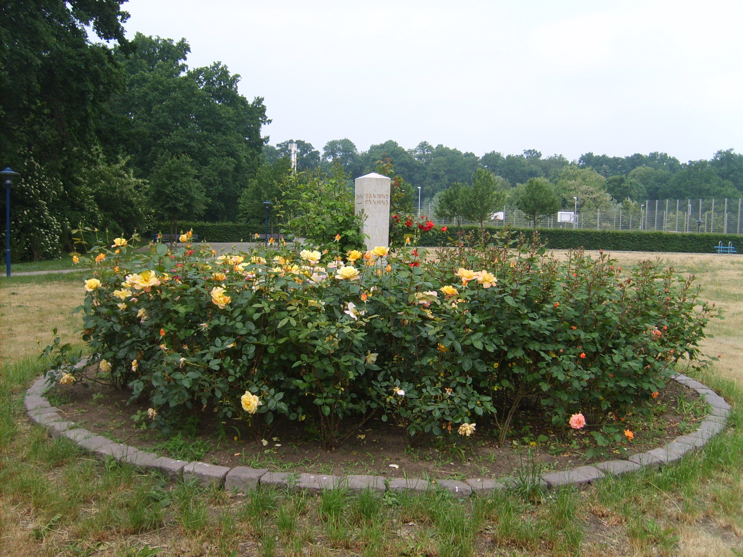 Von Rosen umgebene Stele in Bad Liebenwerda zur Erinnerung an das Zusammentreffen amerikanischer und sowjetischer Truppen während des Zweiten Weltkriegs in der Nähe von Torgau.